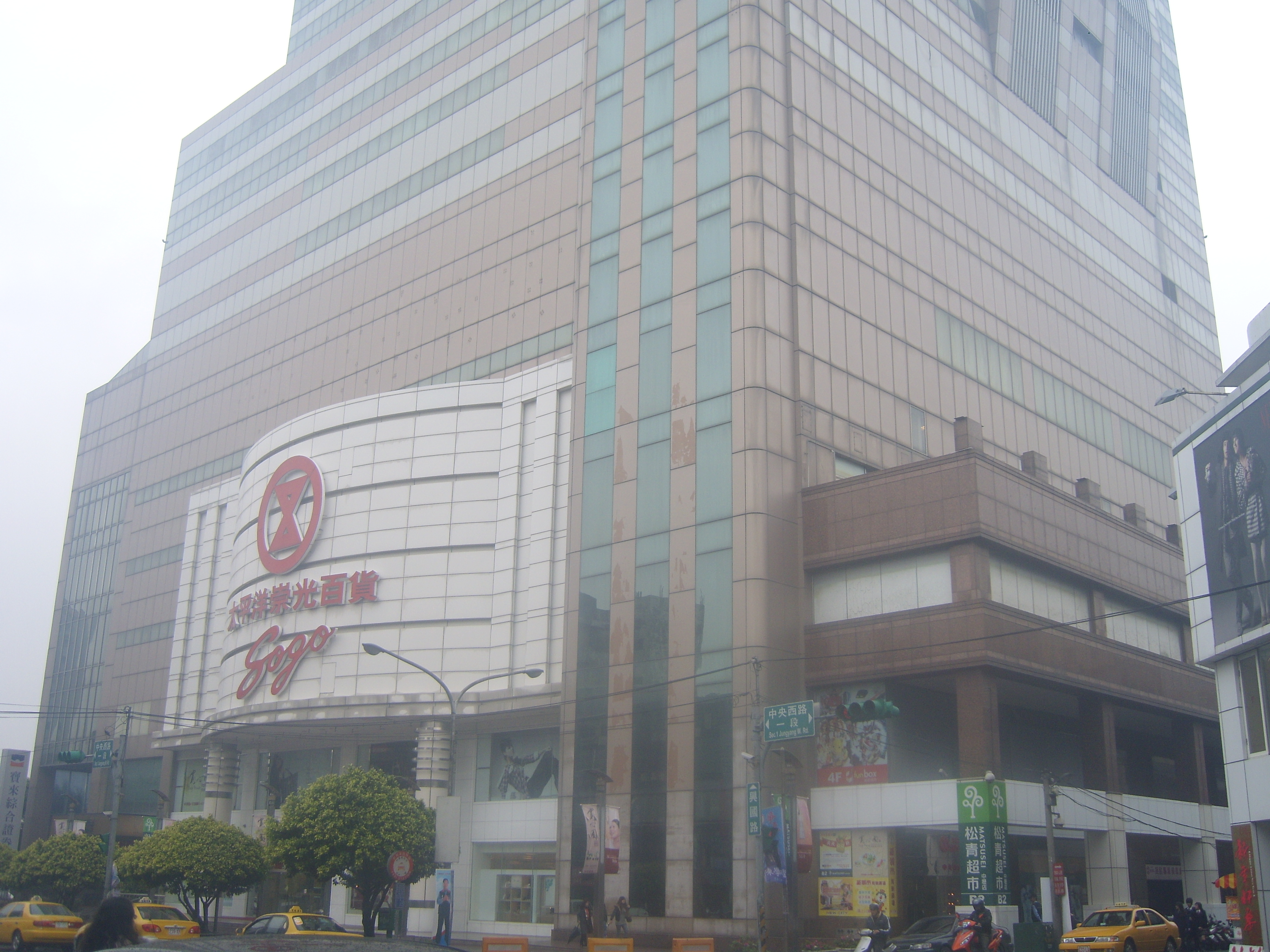 中文（台灣）: 太平洋崇光百貨中壢中央新館，地址：桃園縣中壢市中央西路一段120號（世貿財星廣場）。2011年3月結束營業。